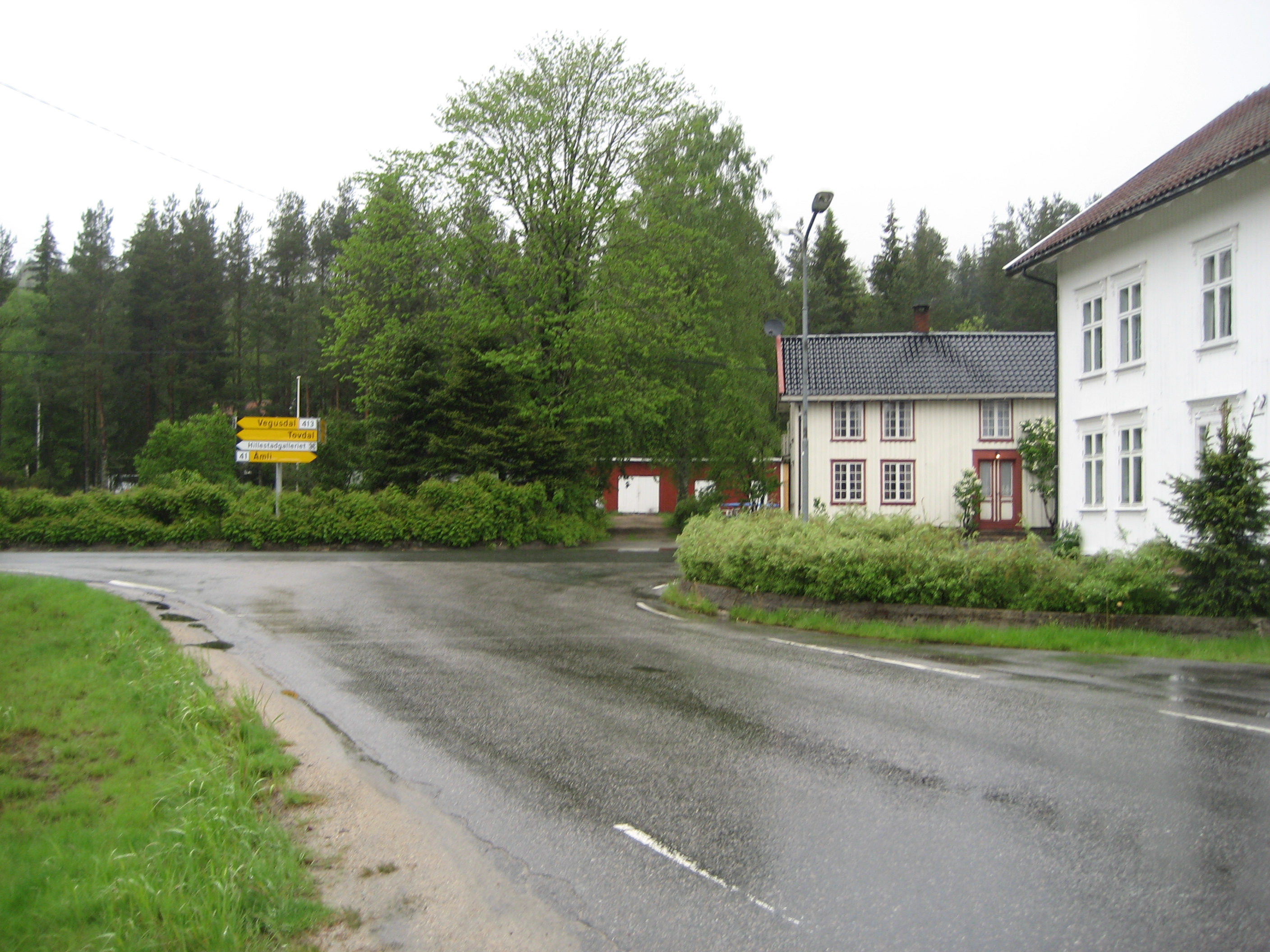 Parti av Dølemo sentrum